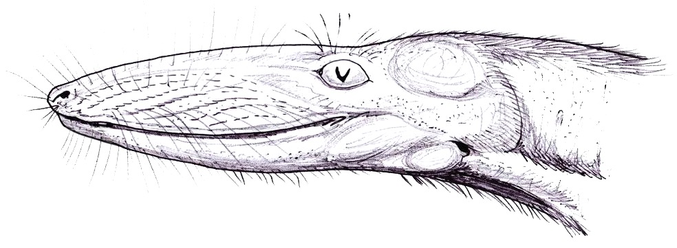 Tetracynodon